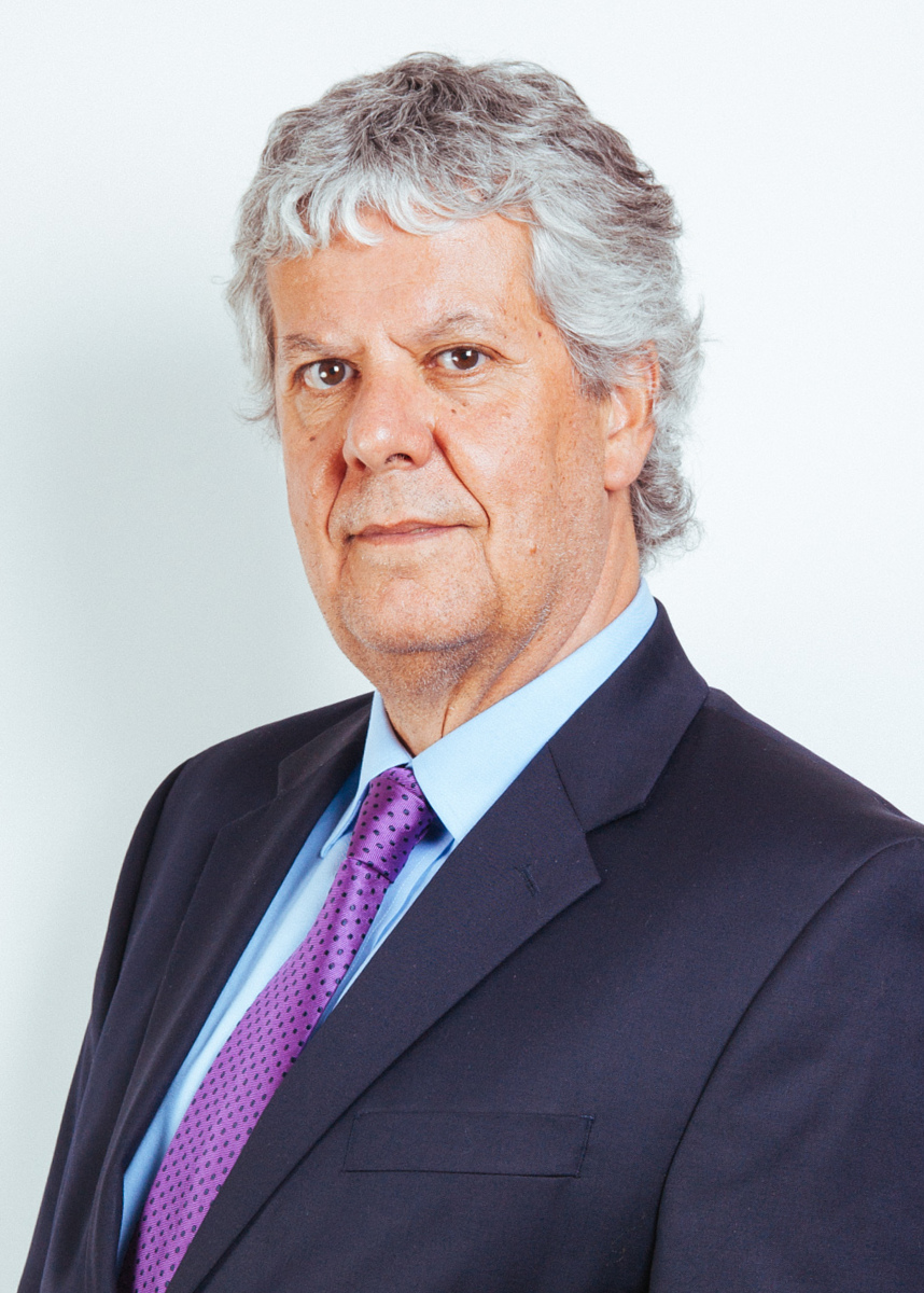 Nicolás Eyzaguirre